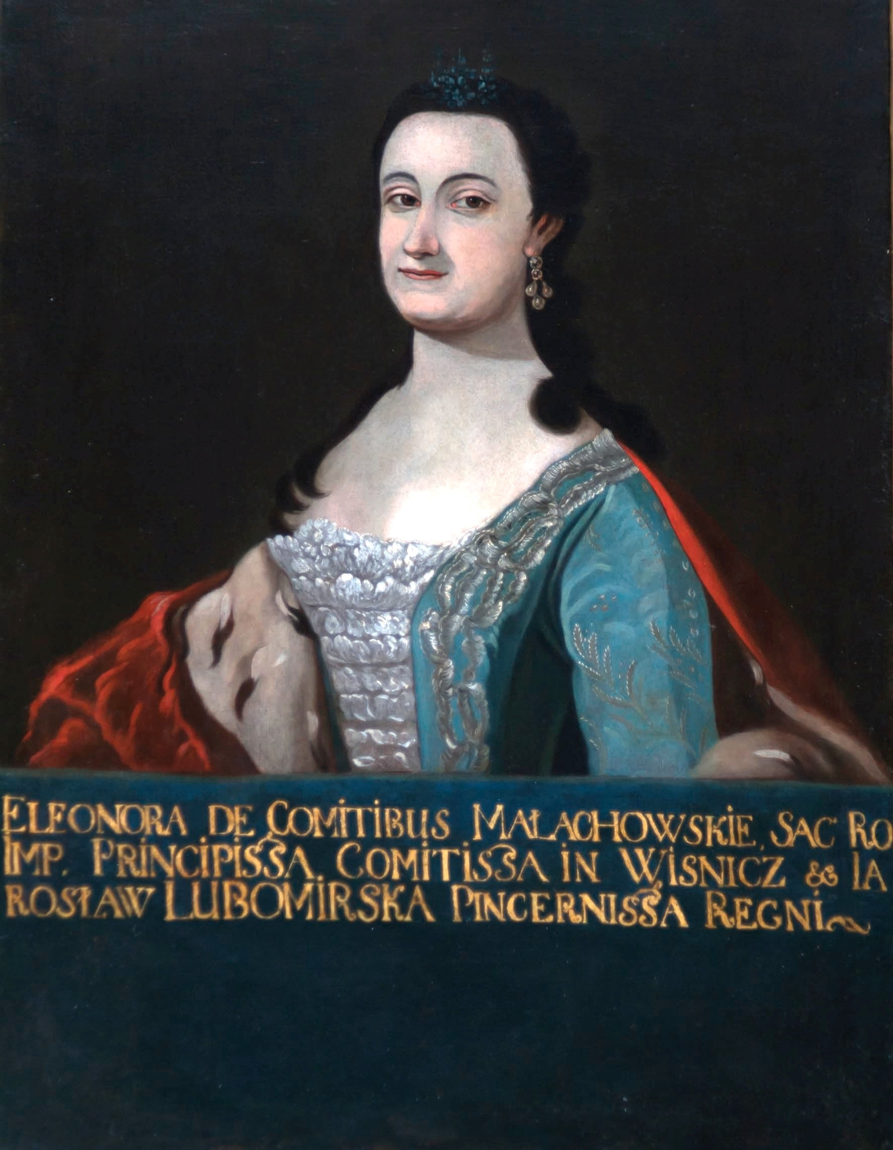 Portret Eleonory Teodorowej z Małachowskich Lubomirskiej Olej na płótnie Klasztor OO. Bernardynów w Rzeszowie (refektarz)